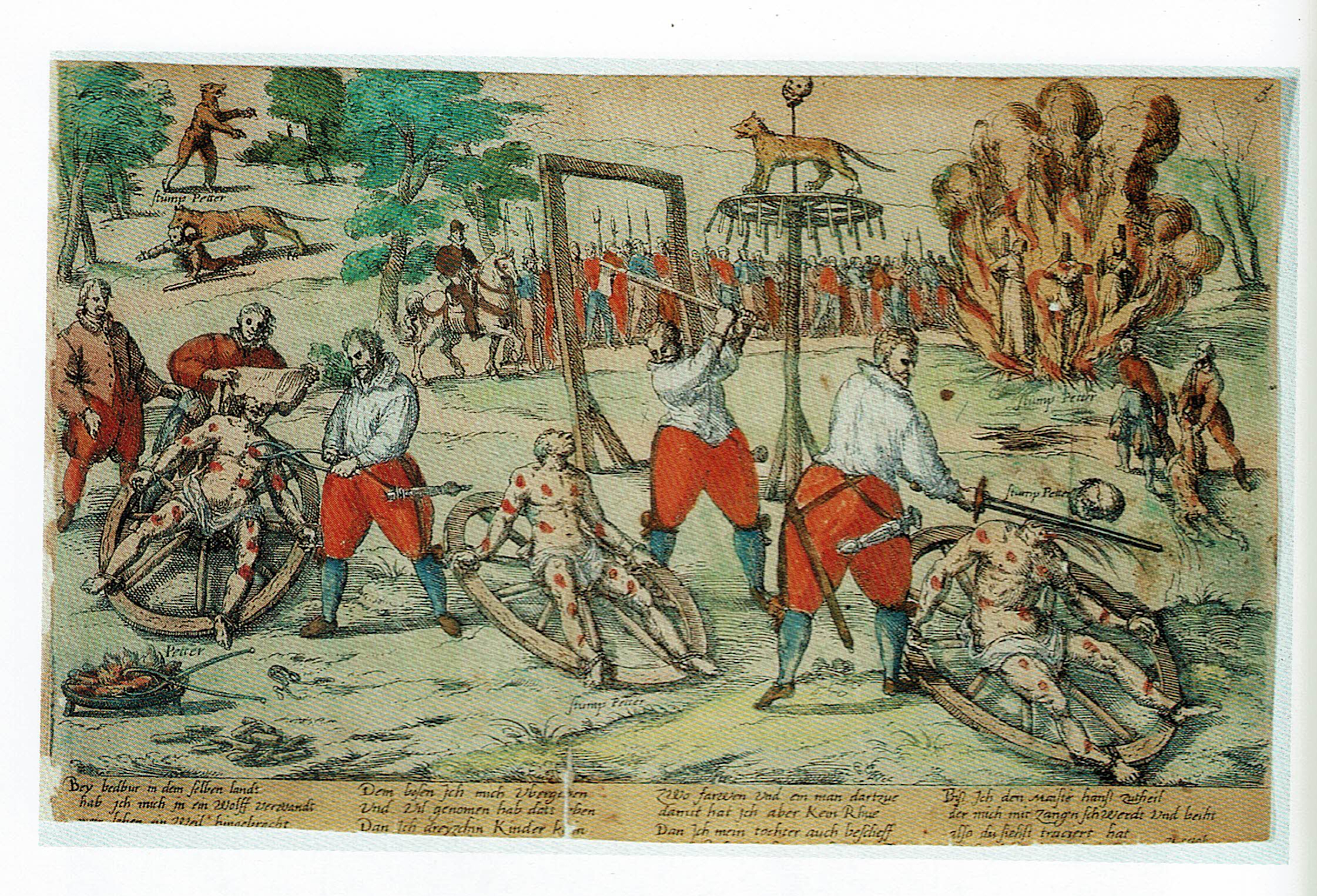 Hinrichtung des angeblichen Werwolfs Peter Stump. Kölner Flugblatt im Thesaurus picturarum